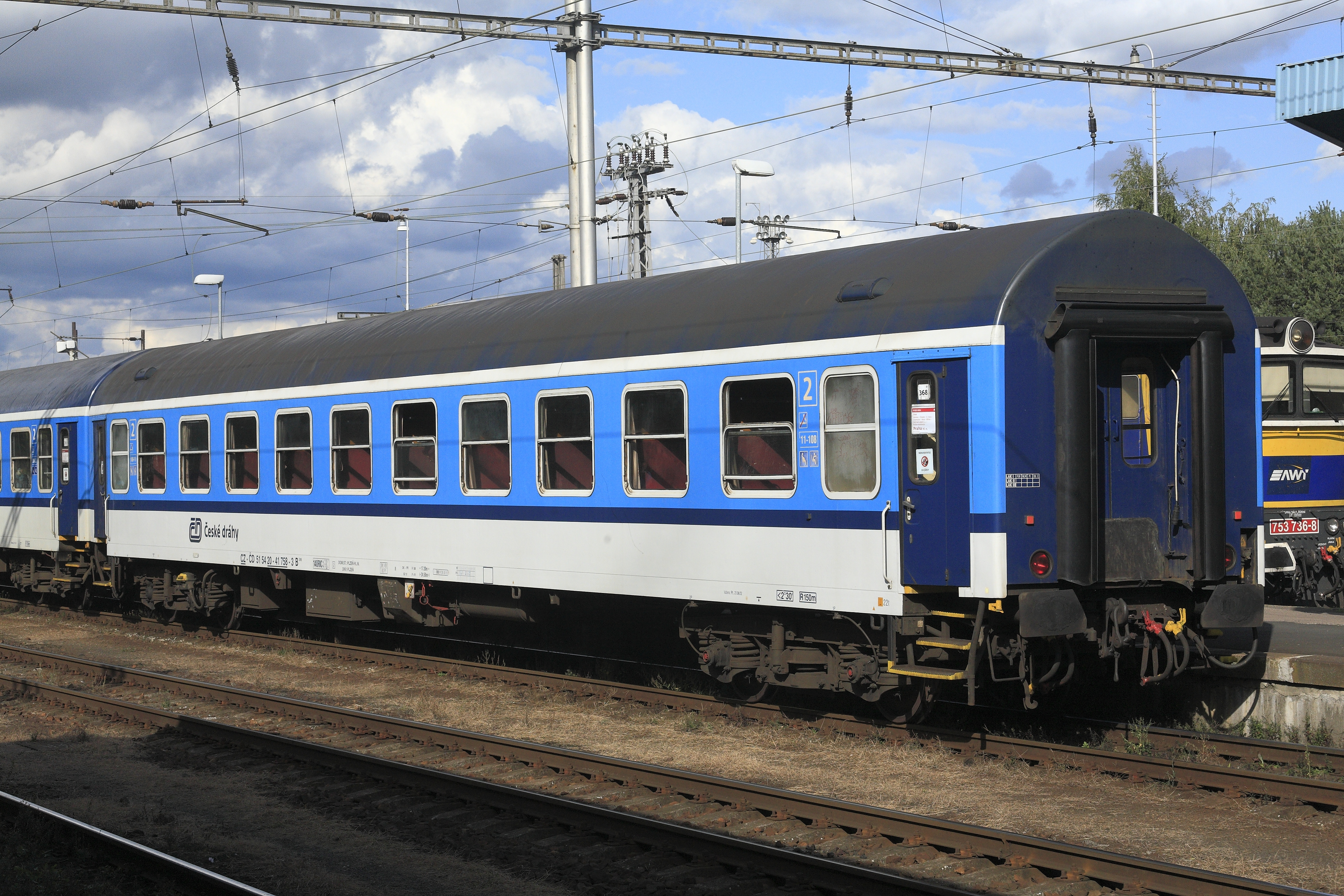 vom Waggonbau Bautzen in den 1970er Jahren geliefert. Dieser Wagen ist abgesehen vom Anstrich noch im Lieferzustand. Erkennbare Unterschiede zu den Wagen der Bauart Y sind vier Trittstufen, keine sichtbaren Federglieder zum Geschlossenhalten der Übergangstüren, keine Ölgefäße für die Drehgestellgleitstücke und keine Lufteinläufe im Dach. Auf der Abteilseite gibt es je einen Luftsauger über den Toiletten, auf der Gangseite ein Lüftergitter in Seitenwandmitte. Reine zweite-Klasse-Wagen haben zehn Abteile zwischen den Toiletten.